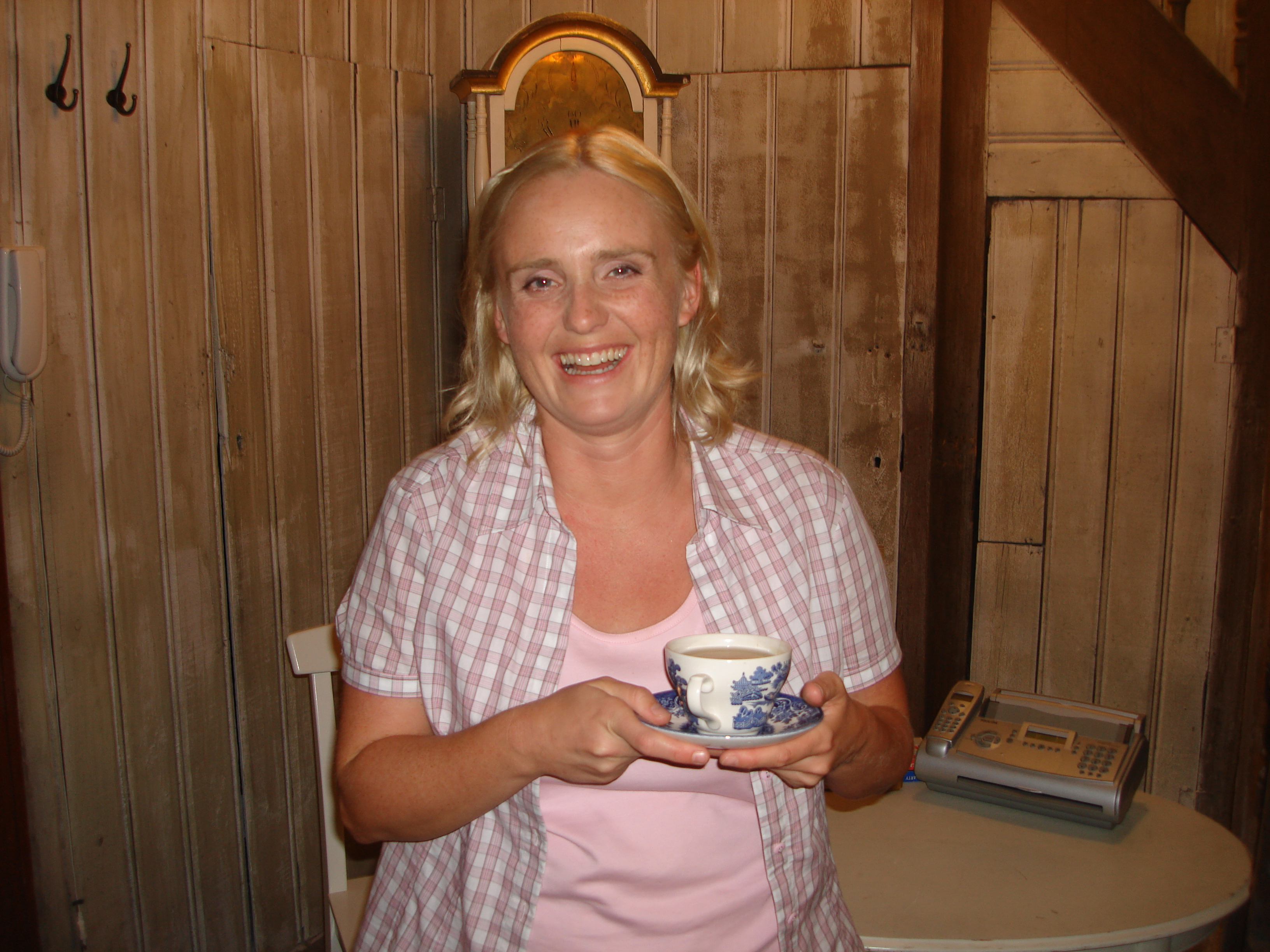 Kinga Preis jako Natalia